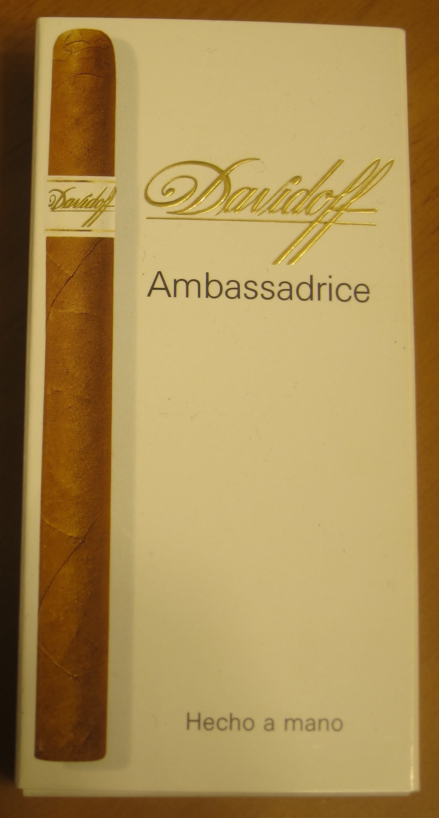 A Dominican-made Davidoff Ambassadrice cigar